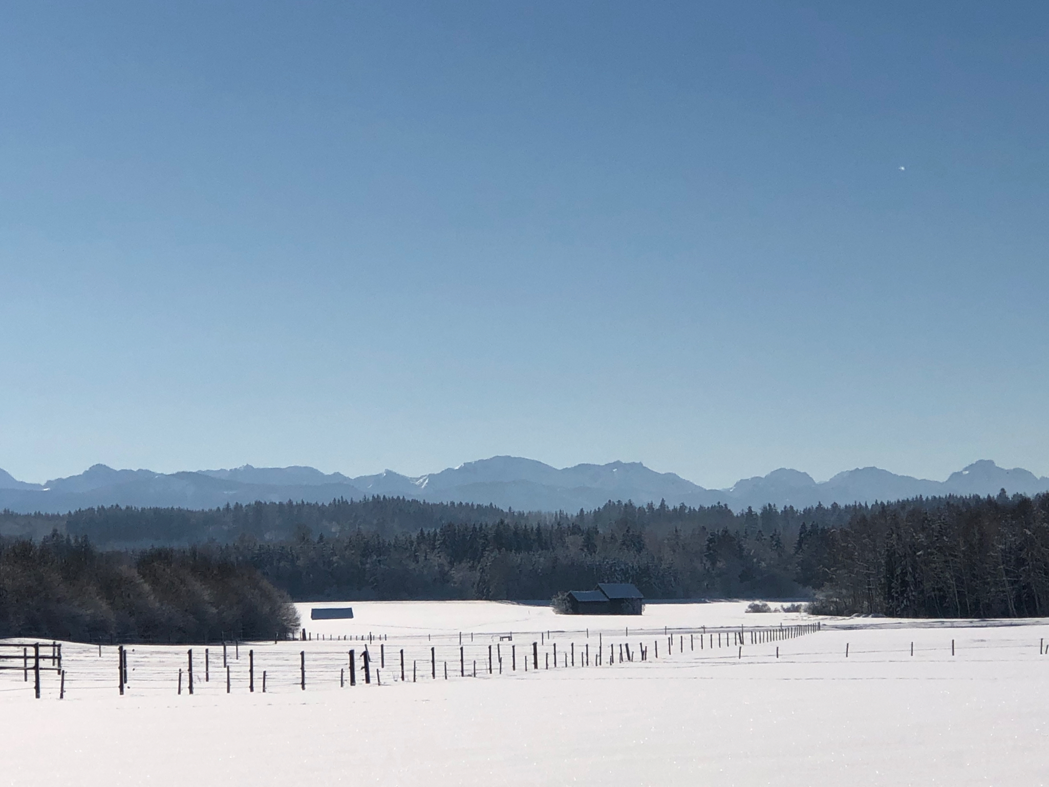 Rott Langes Filz mit Alpen, Landkreis Landsberg am Lech, Bayern, DE, Blick von Norden